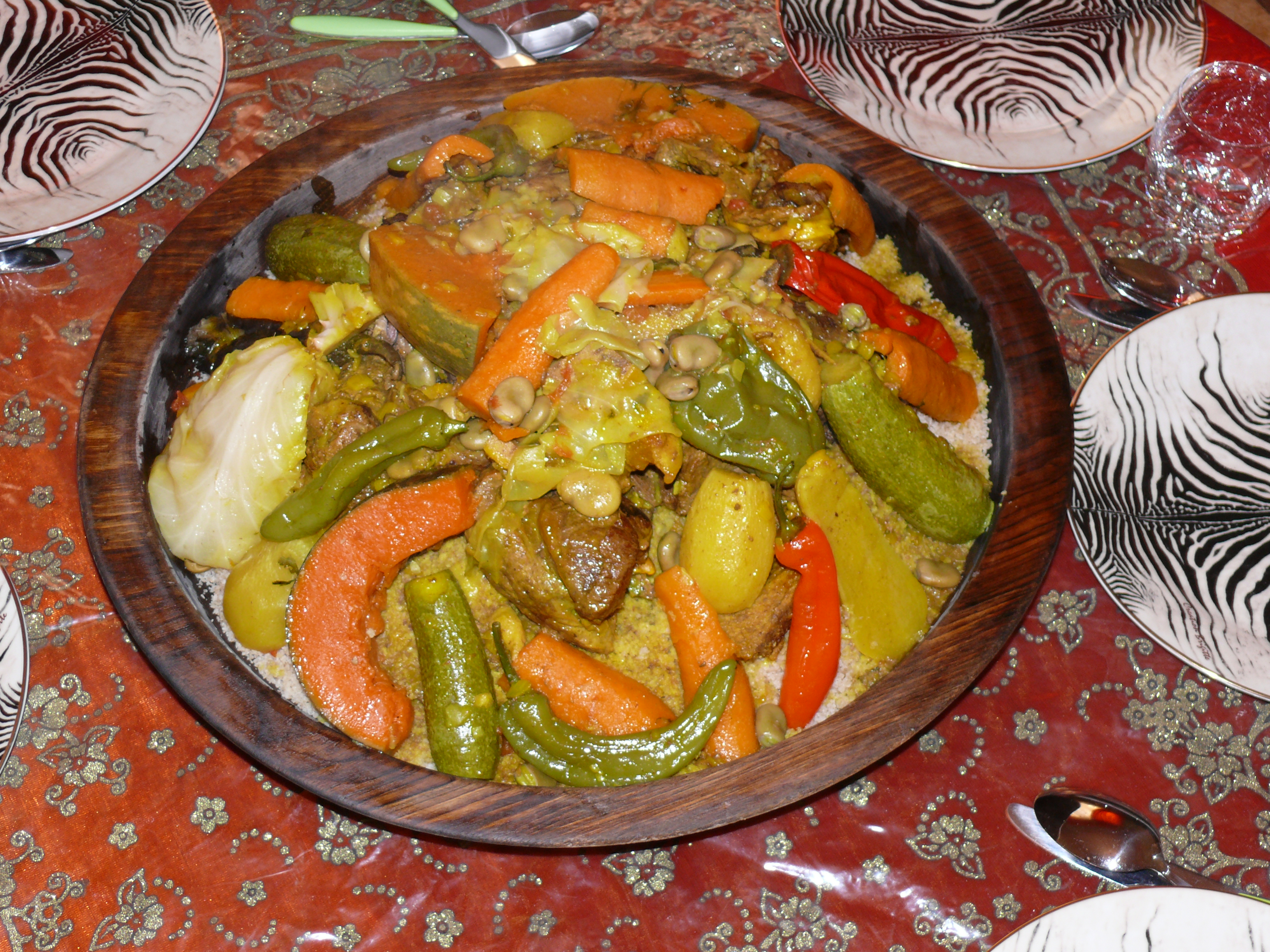 Couscous mit Kamelfleisch (Süd-Marokko)